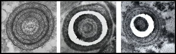 Sphérites vus au microscope élestronique